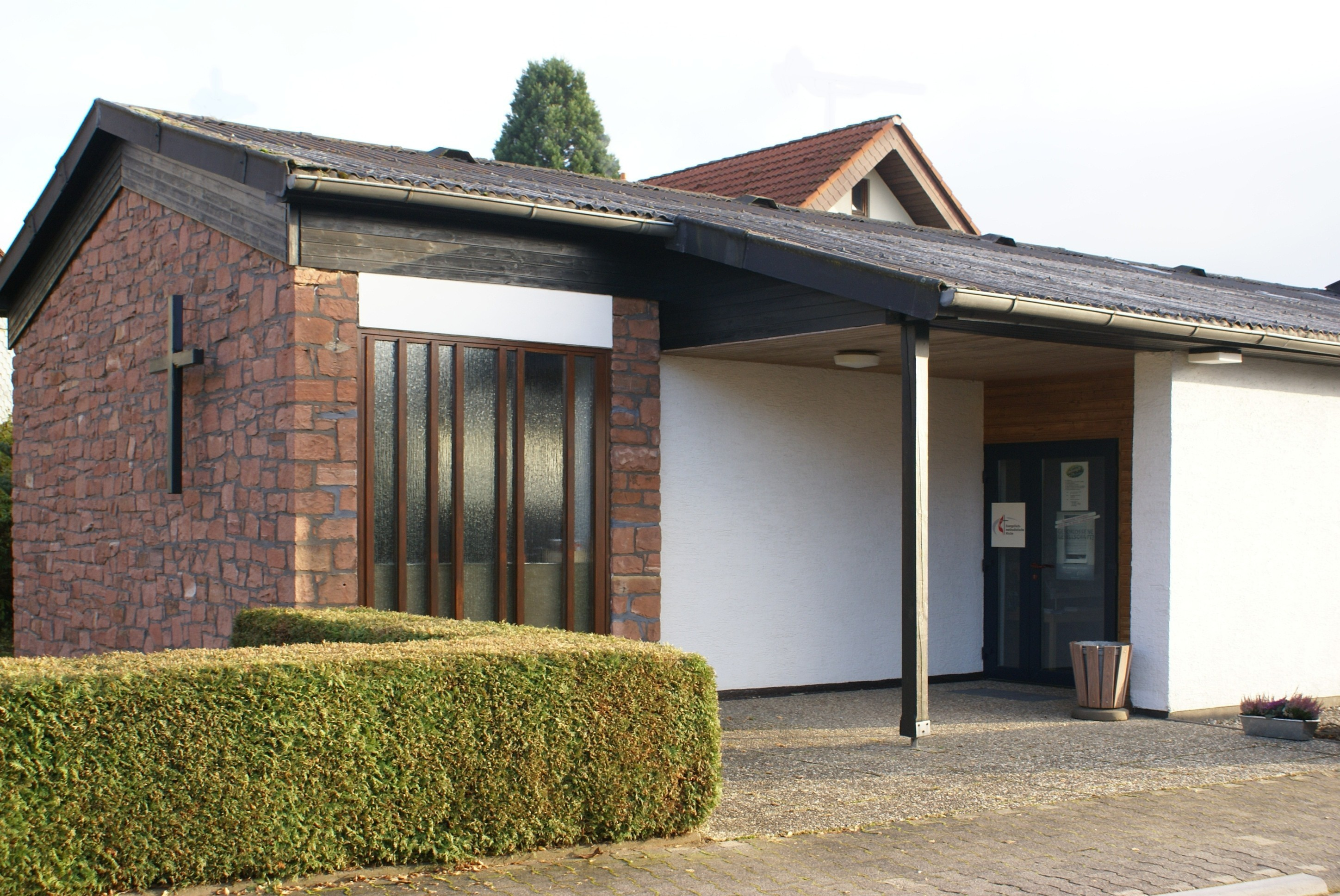 Christuskapelle (evangelische Methodistenkirche) in Großenhausen, Gemeinde Linsengericht